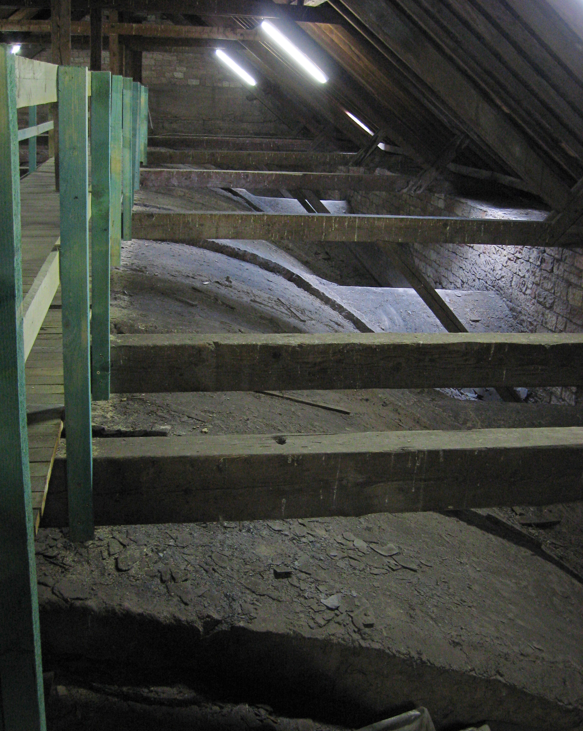 Über dem Mittelschiff